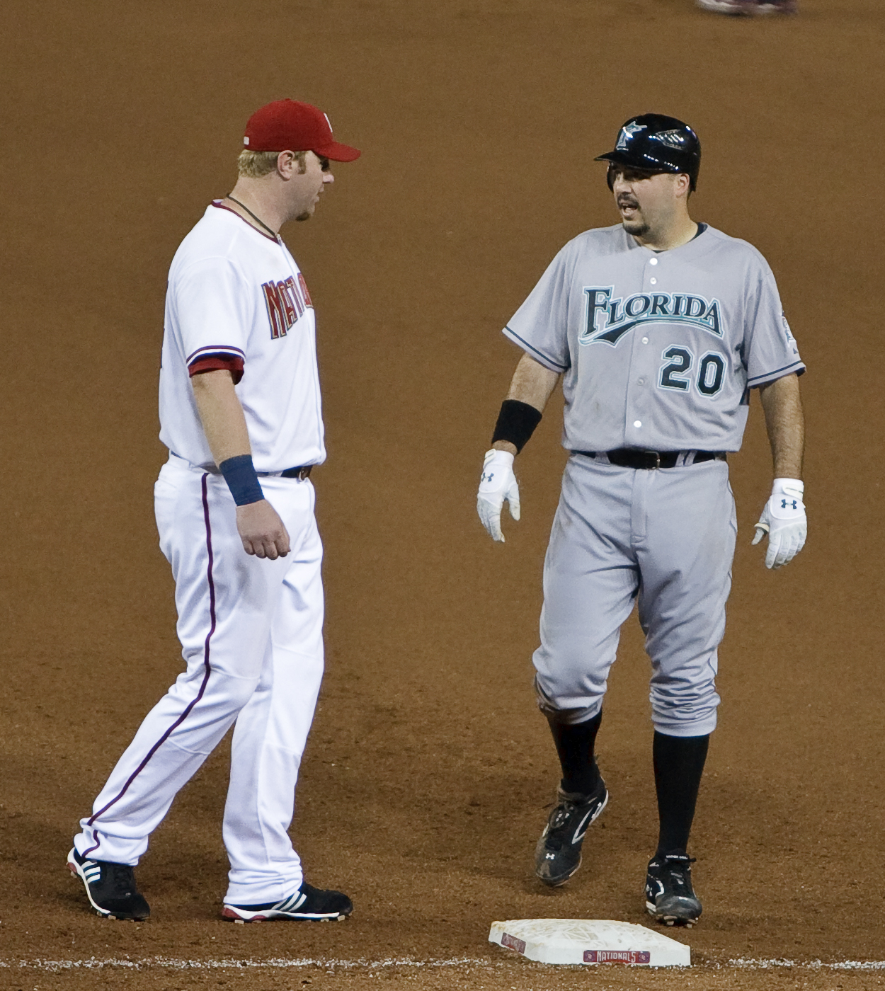 Adam Dunn (left) and Nick Johnson